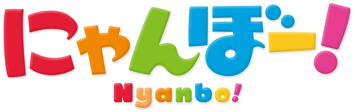 にゃんぼー!